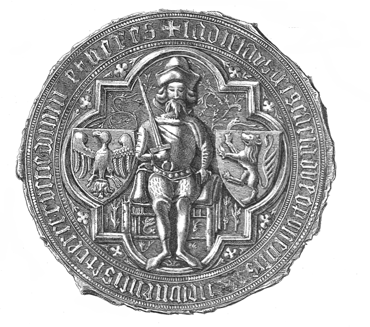 Władysław Opolczyk seal